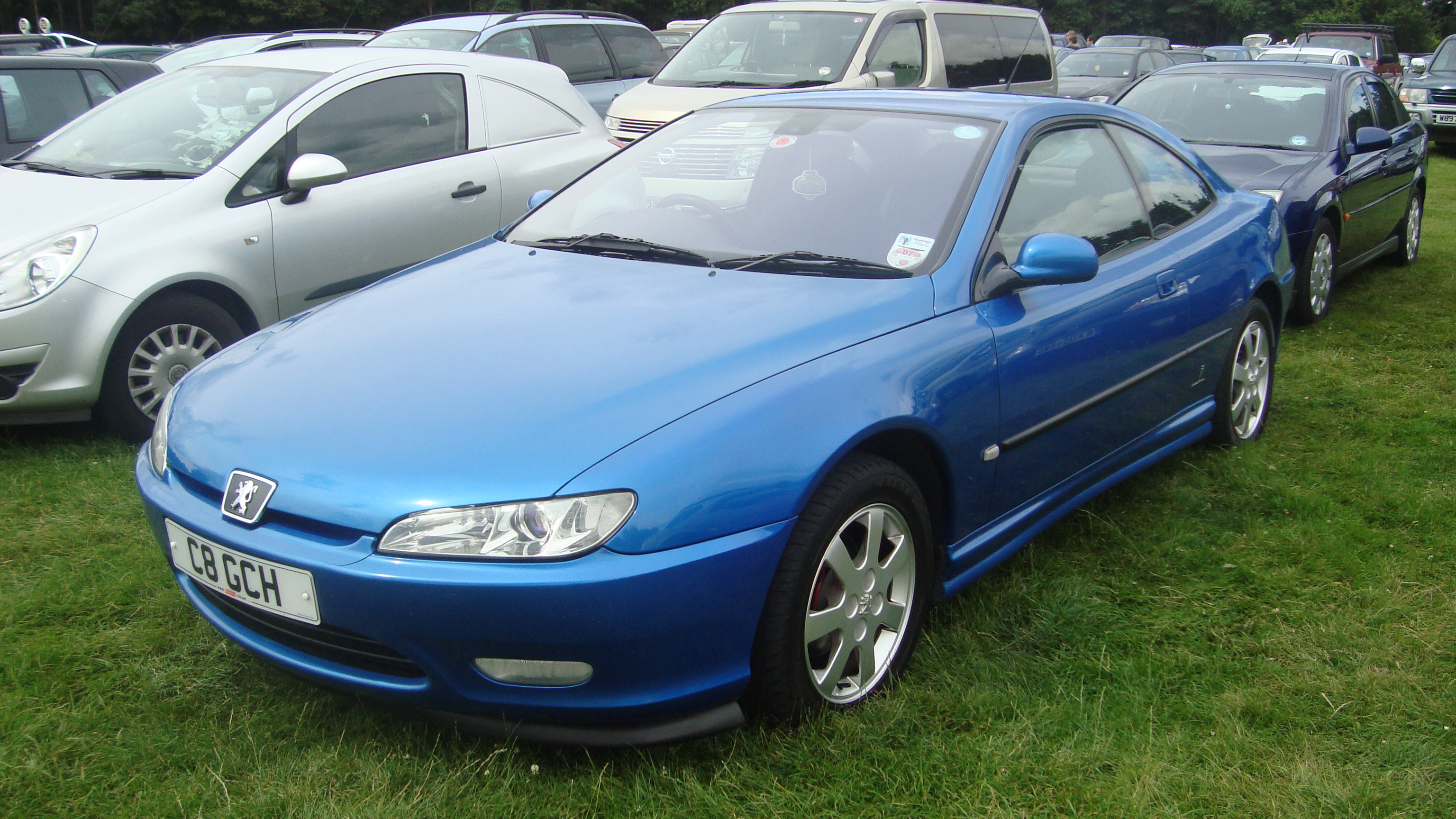 2004 Peugeot 406 Coupe 2.2 Diesel